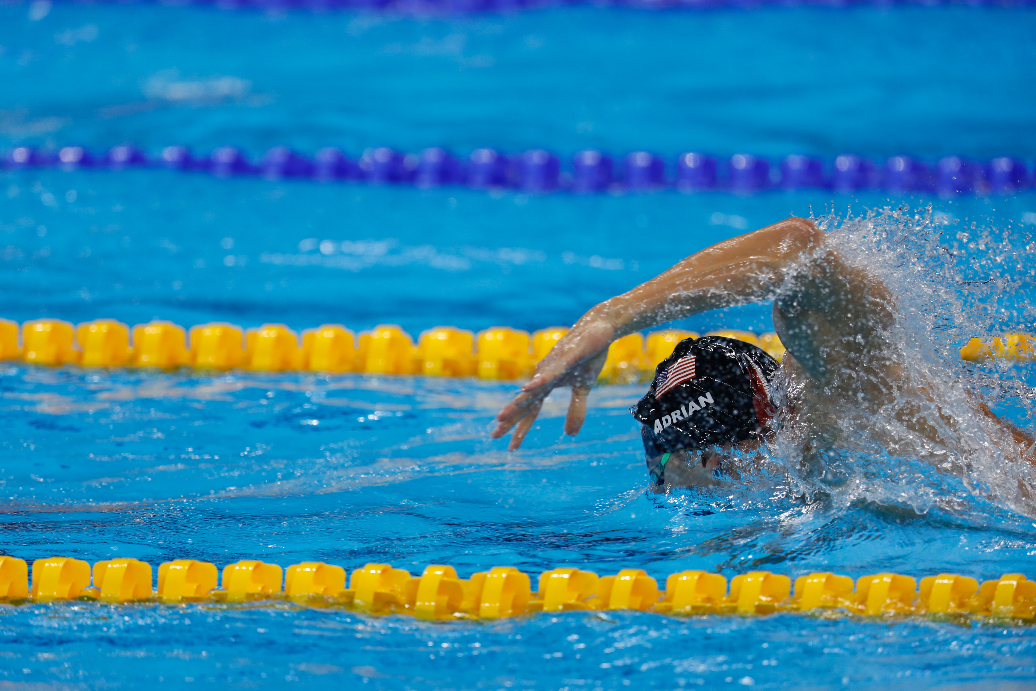 Rio de Janeiro - Nadadora norte-americana Katie Ledecky bate recorde mundial e leva medalha de ouro nos 400m livre nos Jogos Olímpicos Rio 2016 (Fernando Frazão/Agência Brasil)